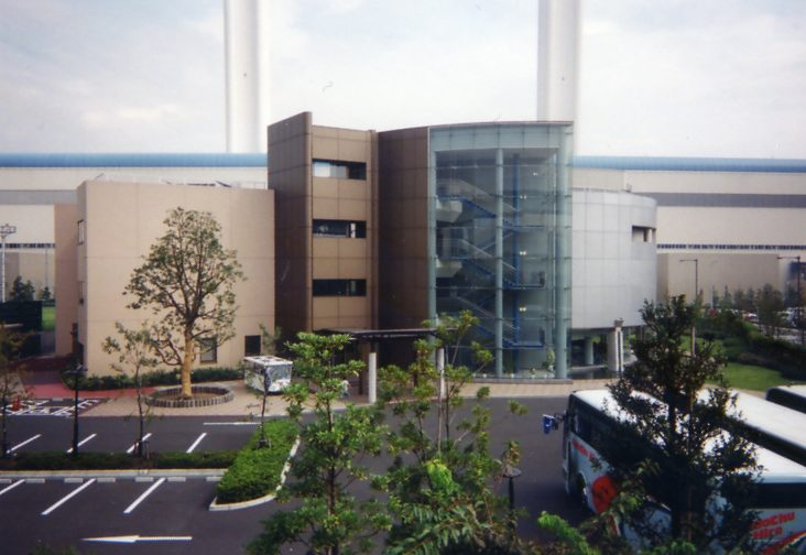 横浜火力発電所内トゥウィニー・ヨコハマ。公開中止時の外観も同じ。神奈川県横浜市、1999年10月撮影。